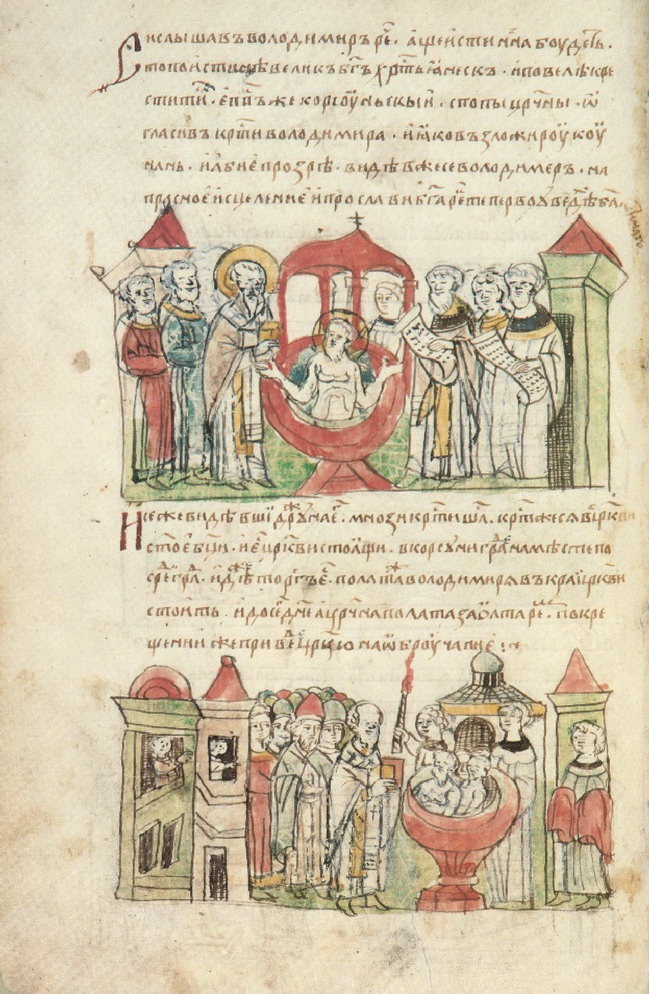 Радзивилловская (Кёнигсбергская) летопись.